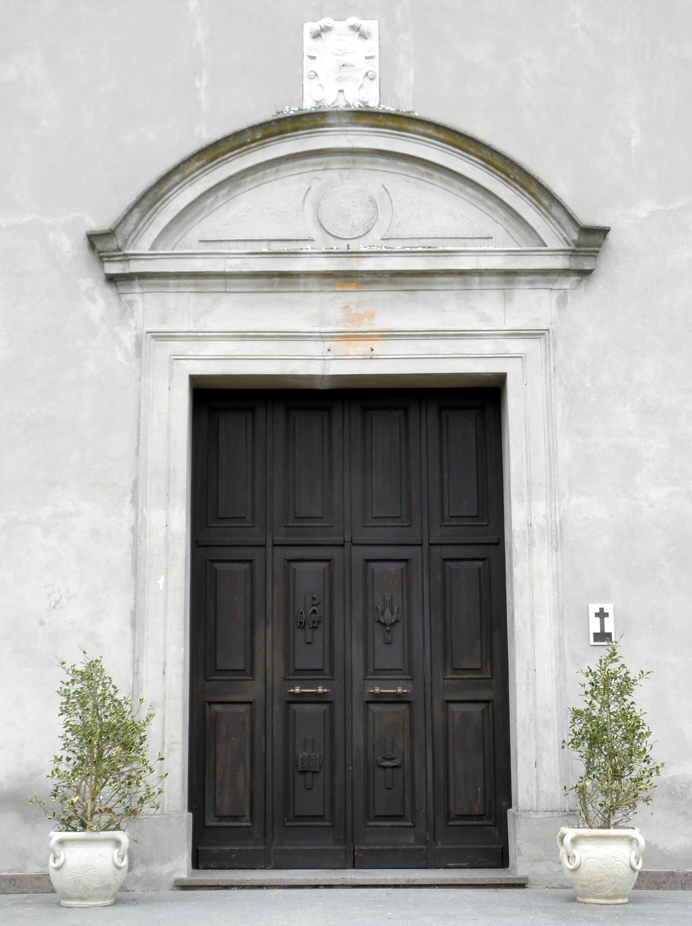 Villamarzana, chiesa parrocchiale di Santo Stefano: il portale principale.